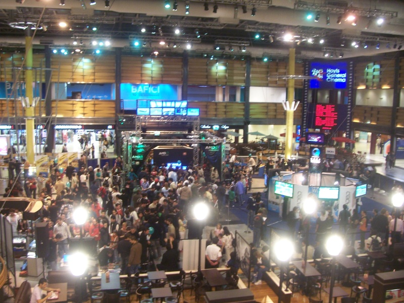 Imagen del MegaTorneo Loaded realizado en el Abasto.